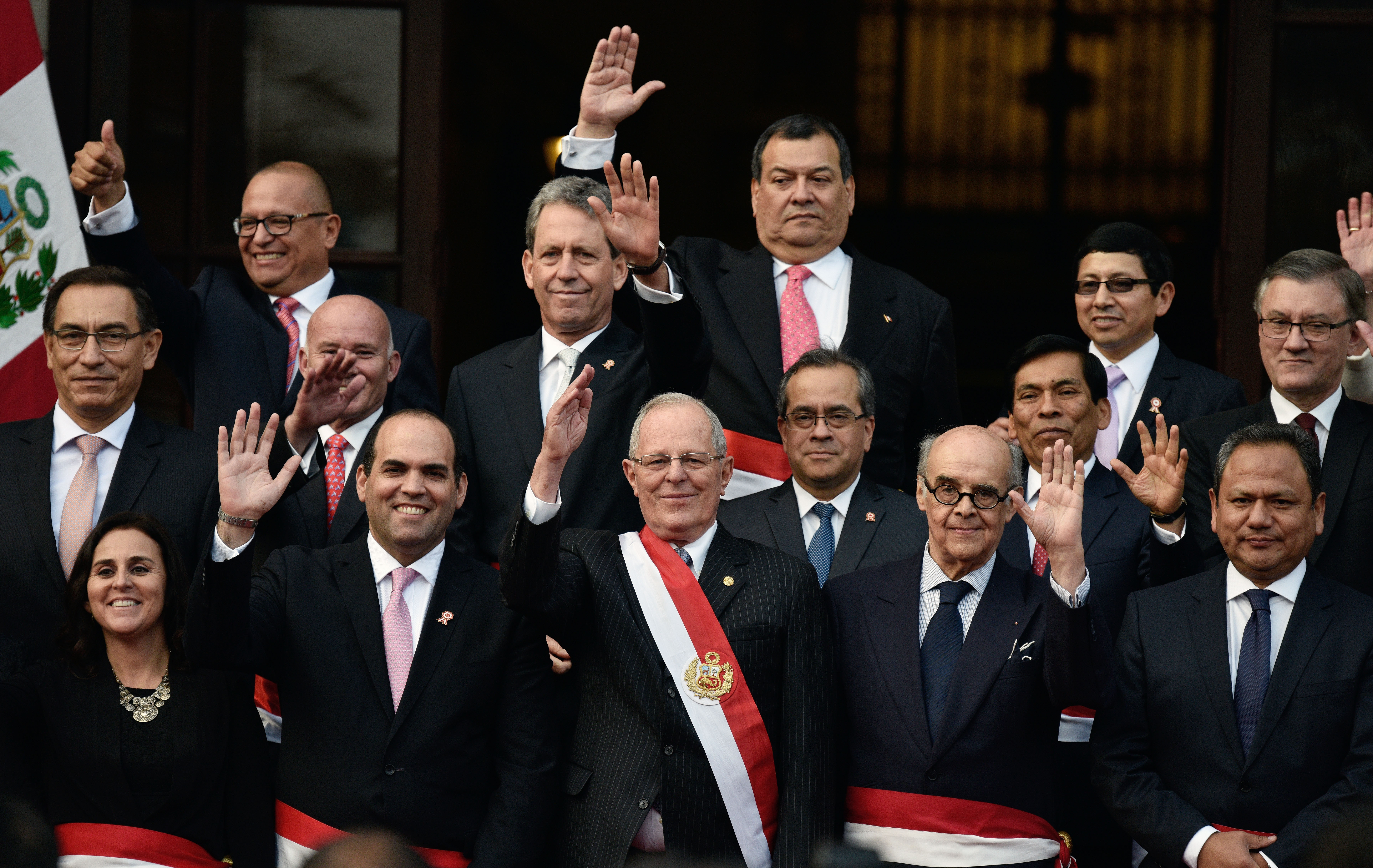 Presidente de la República Pedro Pablo Kuczynski tomó juramento al nuevo Canciller, Embajador Ricardo Luna Mendoza